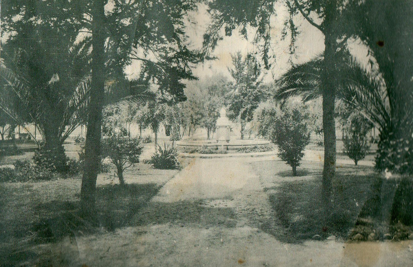 Foto del parque Maria del Carmen en 1930